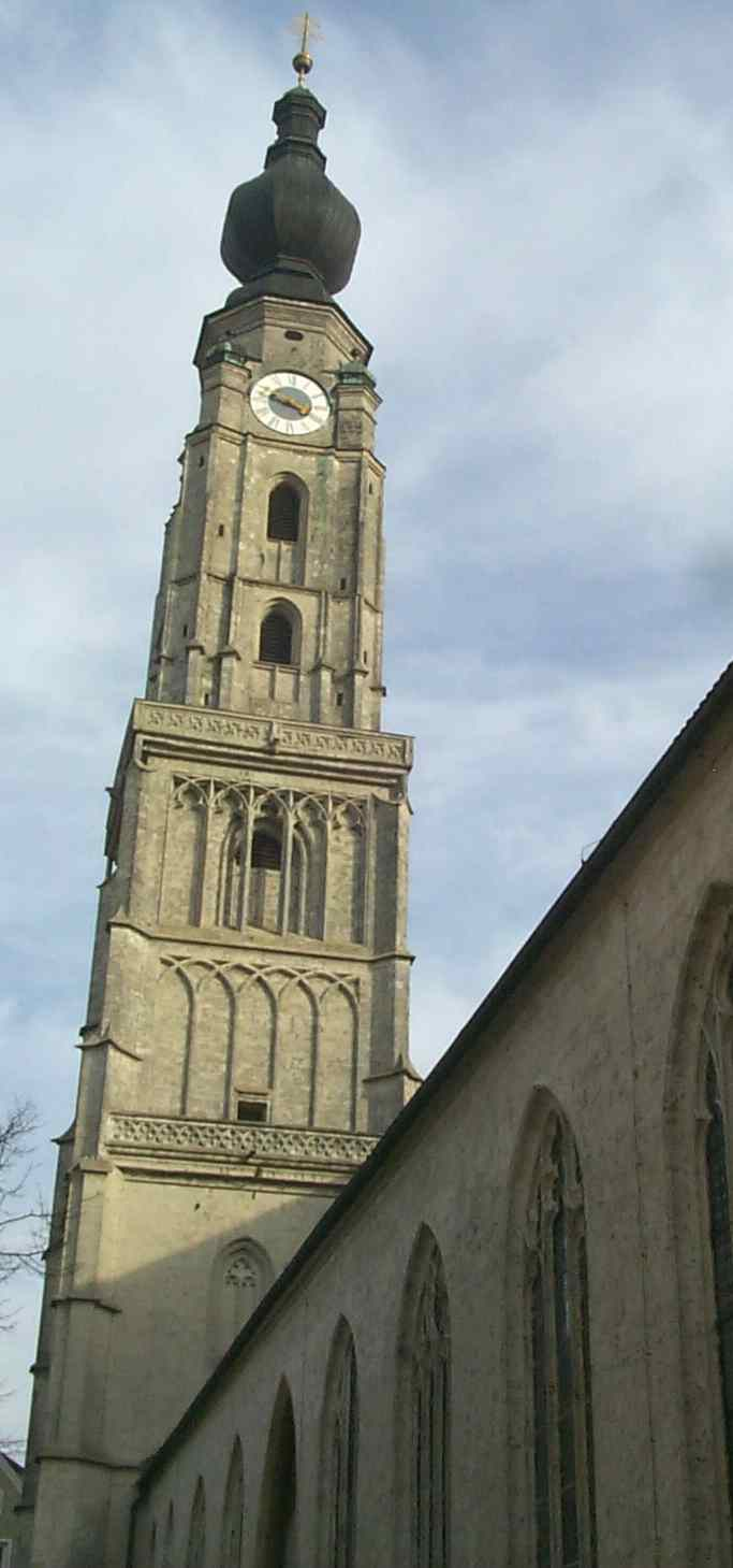 "Steffl" (Kirchturm) der Stadtpfarrkirche Braunau